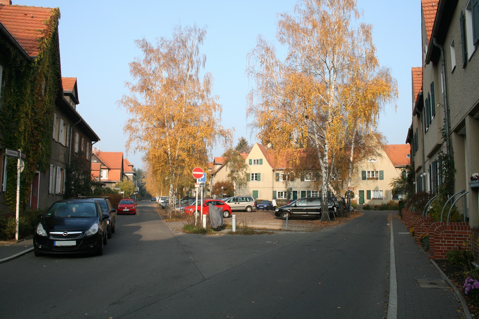 Berlin-Spandau, Akazienweg_Eichenweg Gartendenkmal